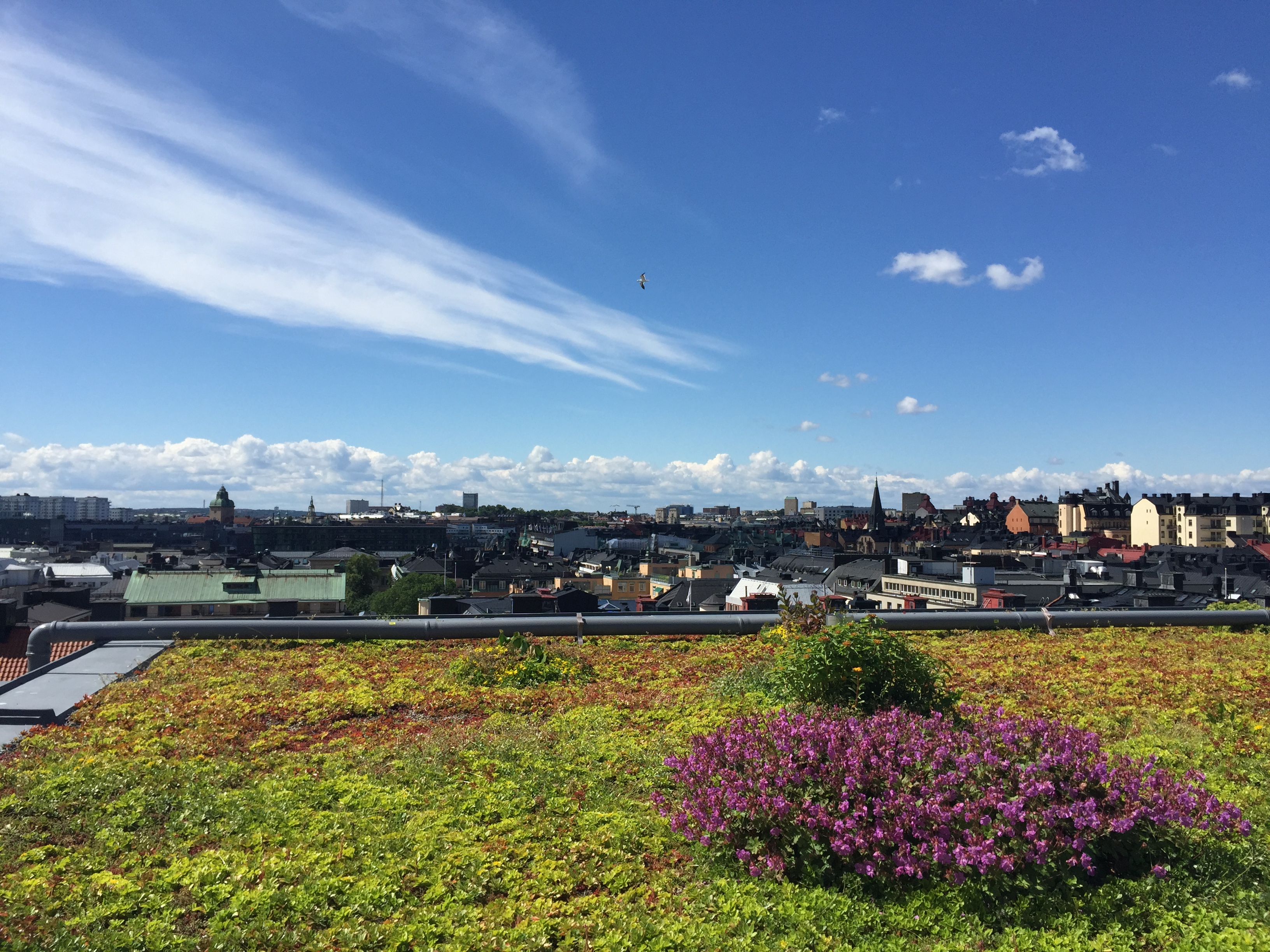 Urban Delis takterass på Sveavägen 44